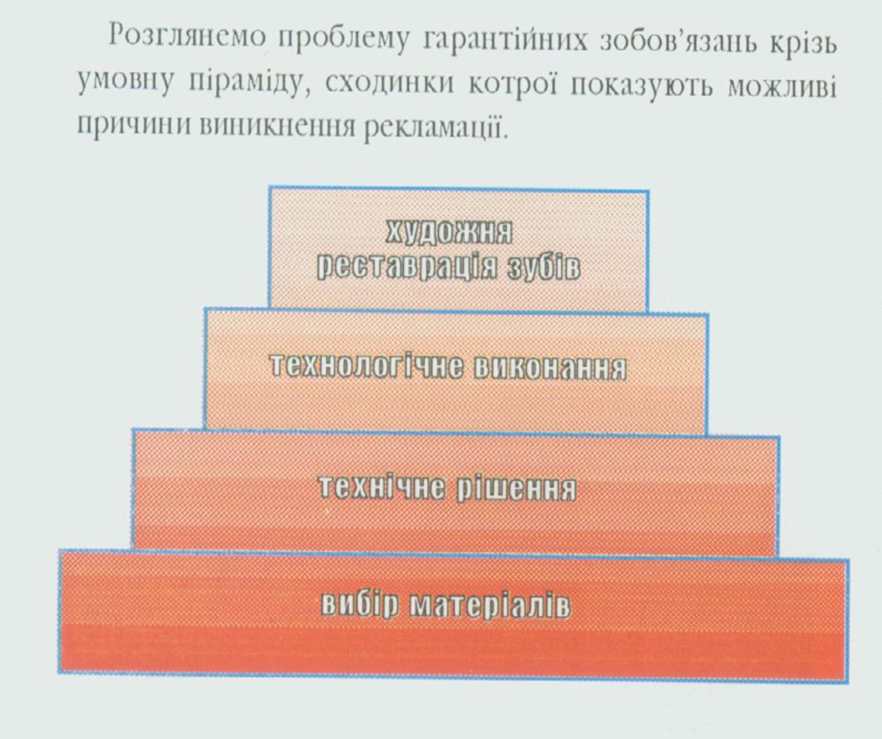 Возможные причины возникновения рекламаций